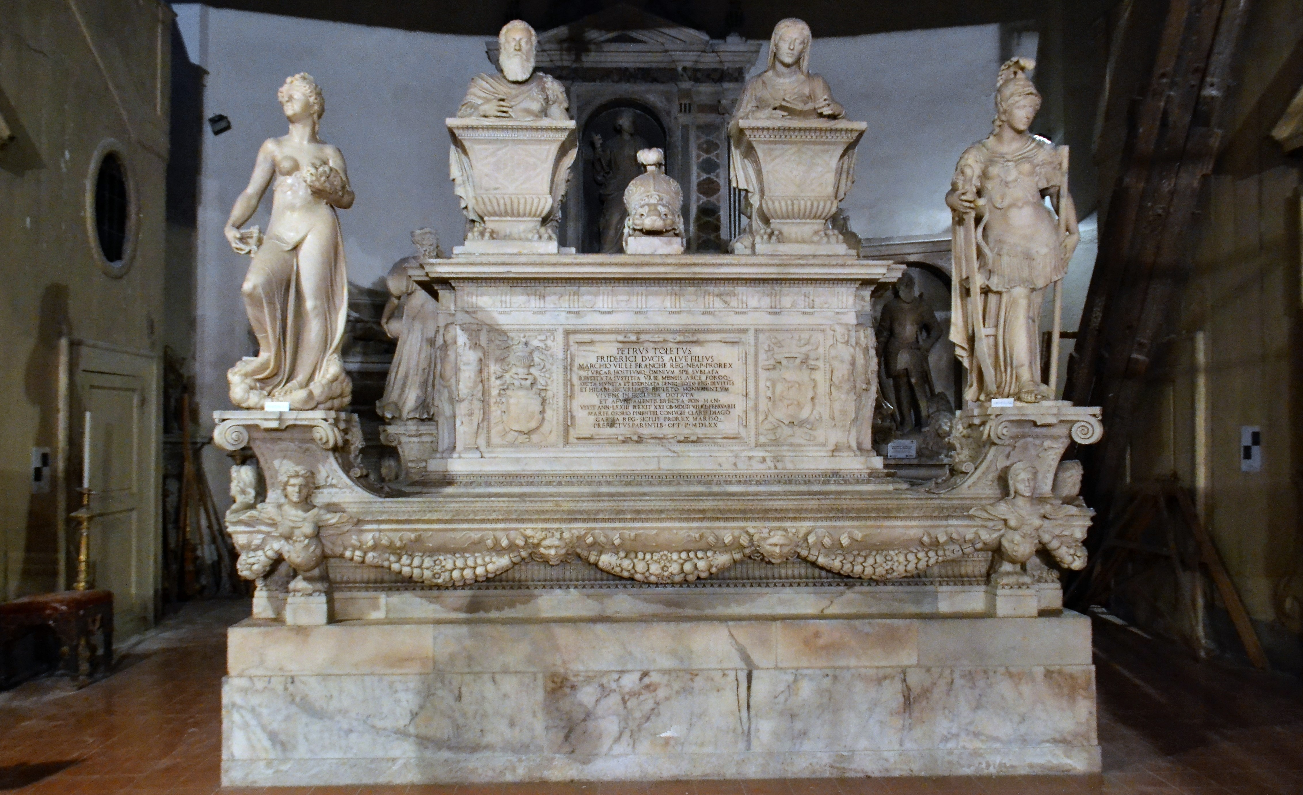 Giovanni da Nola, sepolcro di Don Pedro di Toledo. Napoli, Chiesa di San Giacomo degli Spagnoli.